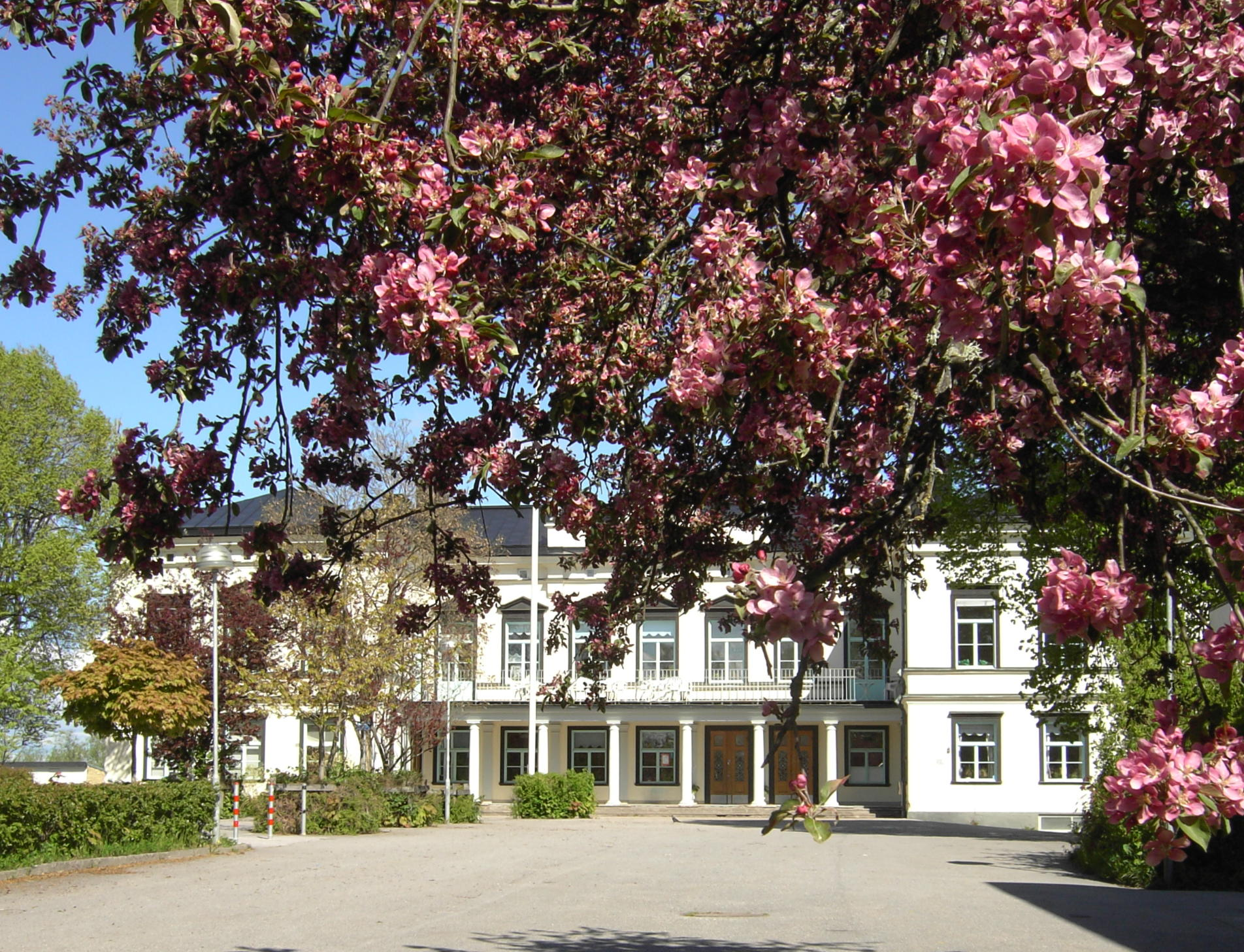 Åby Herrgård, biblioteket och fritidsgård